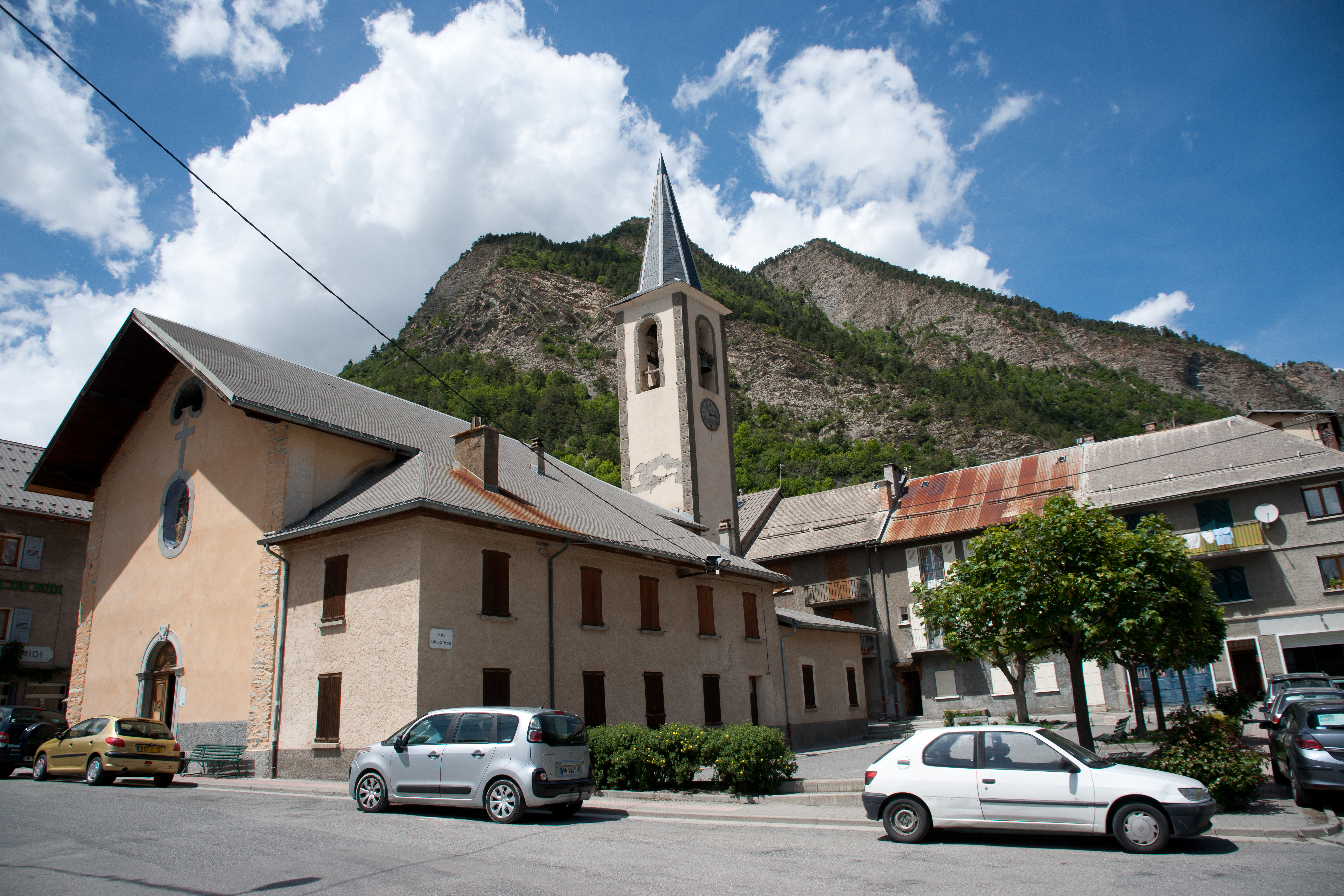 La Condamine-Châtelard - église paroissale Sainte Catherine